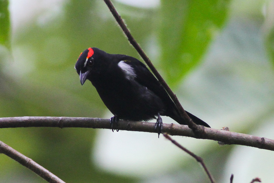 El Paujil Reserve, Boyaca